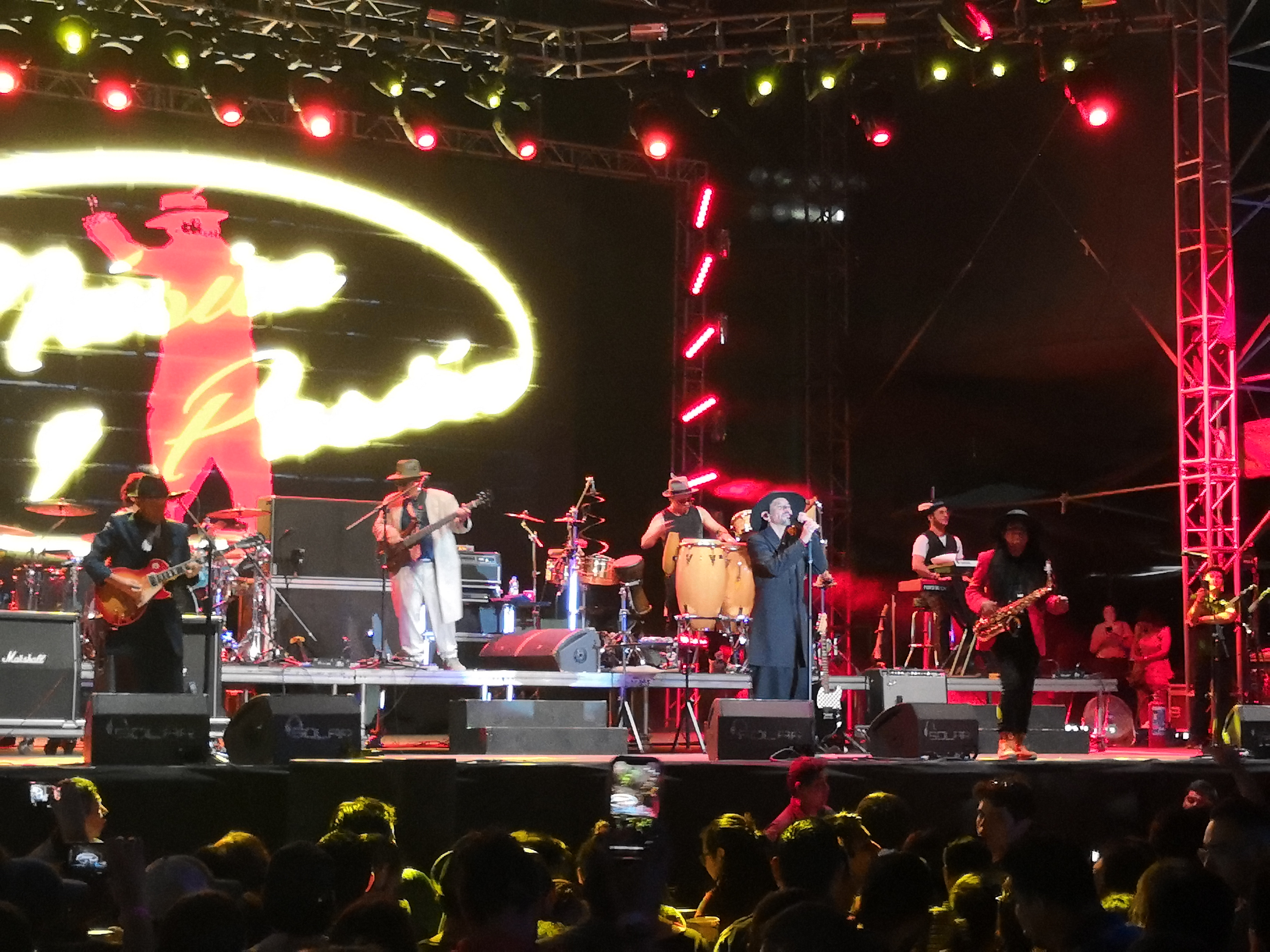 Grupo de rock en concierto